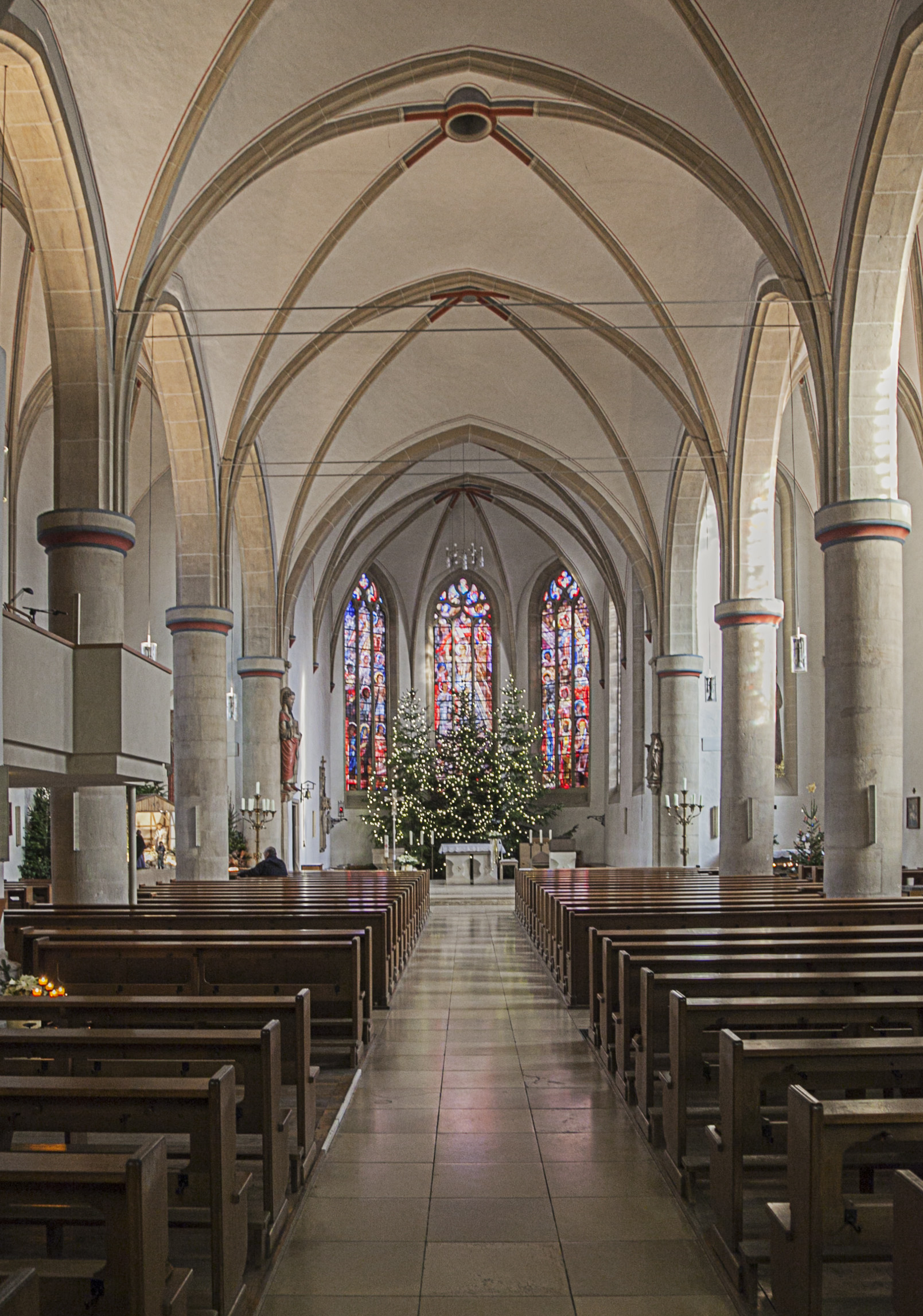 St. Bartholomeus (Laer), Innenansicht, Blick zur Chorapsis